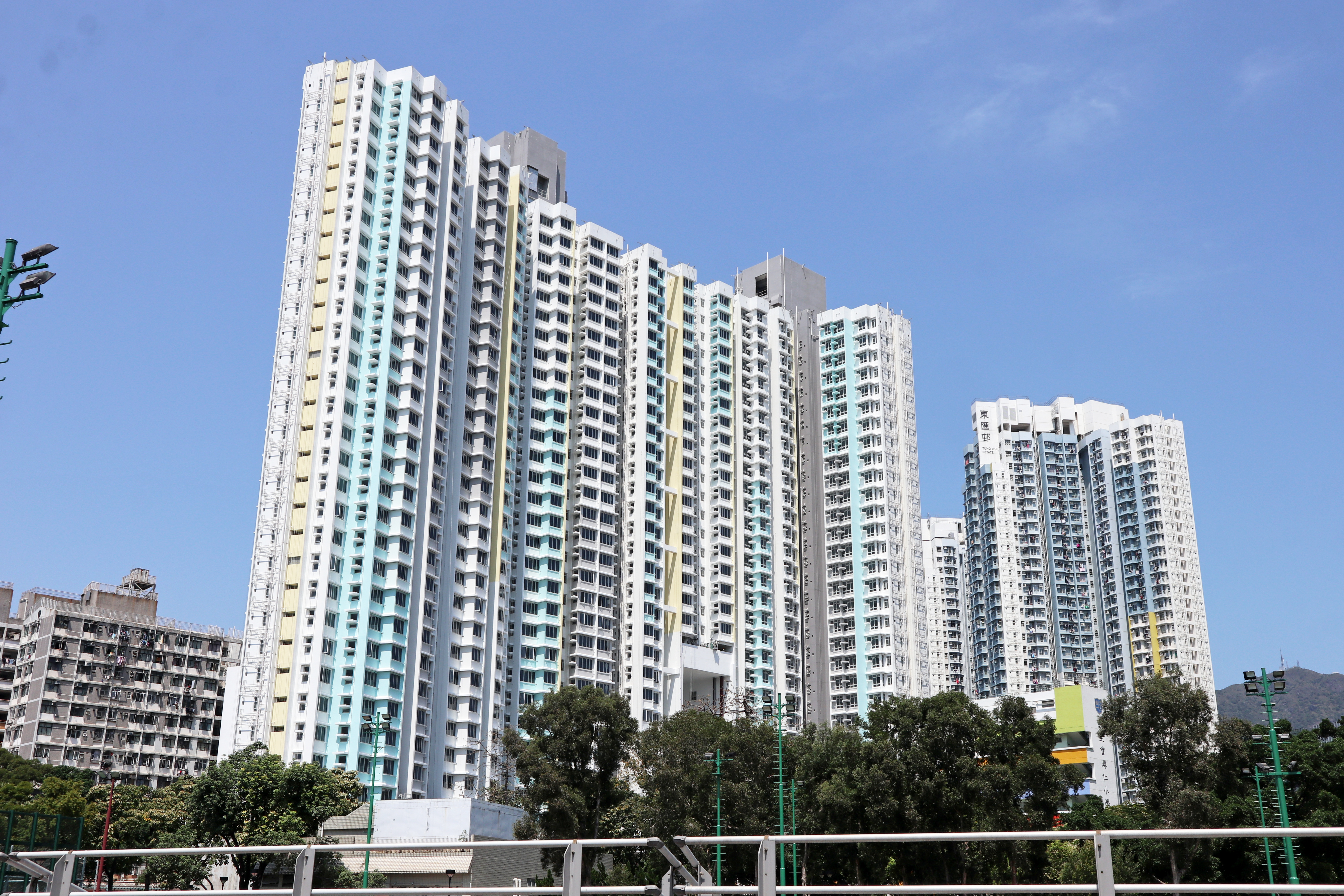 東匯邨各座大廈外觀